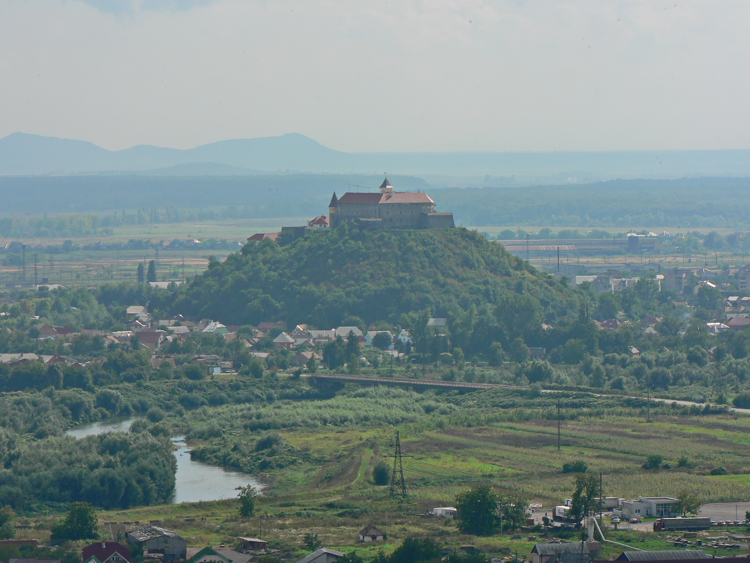 Palanok Castle in Mukachevo